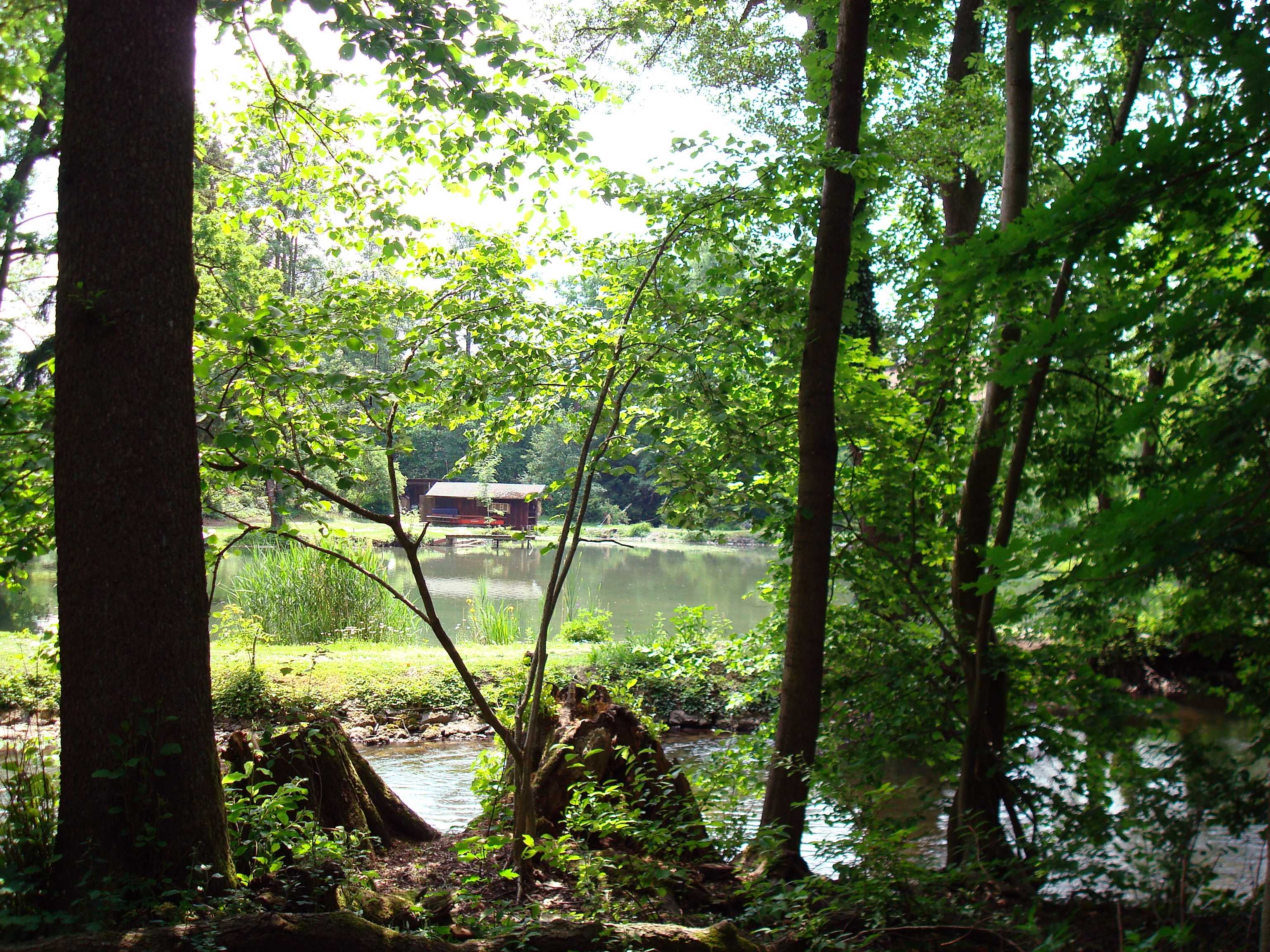 Gauting, Schloss Fußberg, Schlosspark. Die am Schloss Fußberg vorbei fließende Würm ist in die Gestaltung des englischen Landschaftsgartens einbezogen.